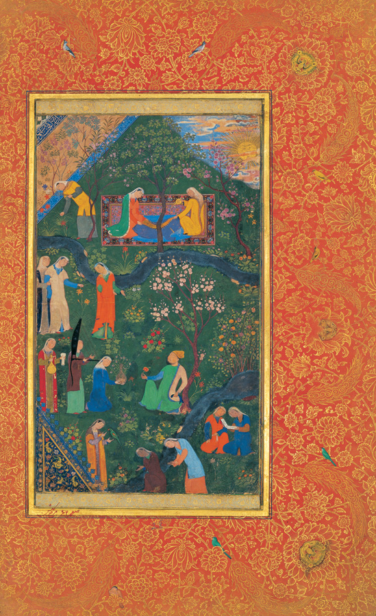 Sultan Hossein Mirza in Promenade (left part), Moraqqa’-e Golshan, p.62, Golestan Palace